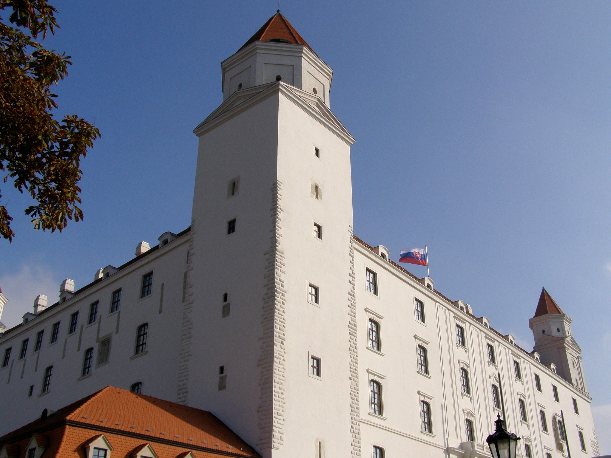 Dominantným architektonickým prvkom kráľovského paláca je Korunná veža